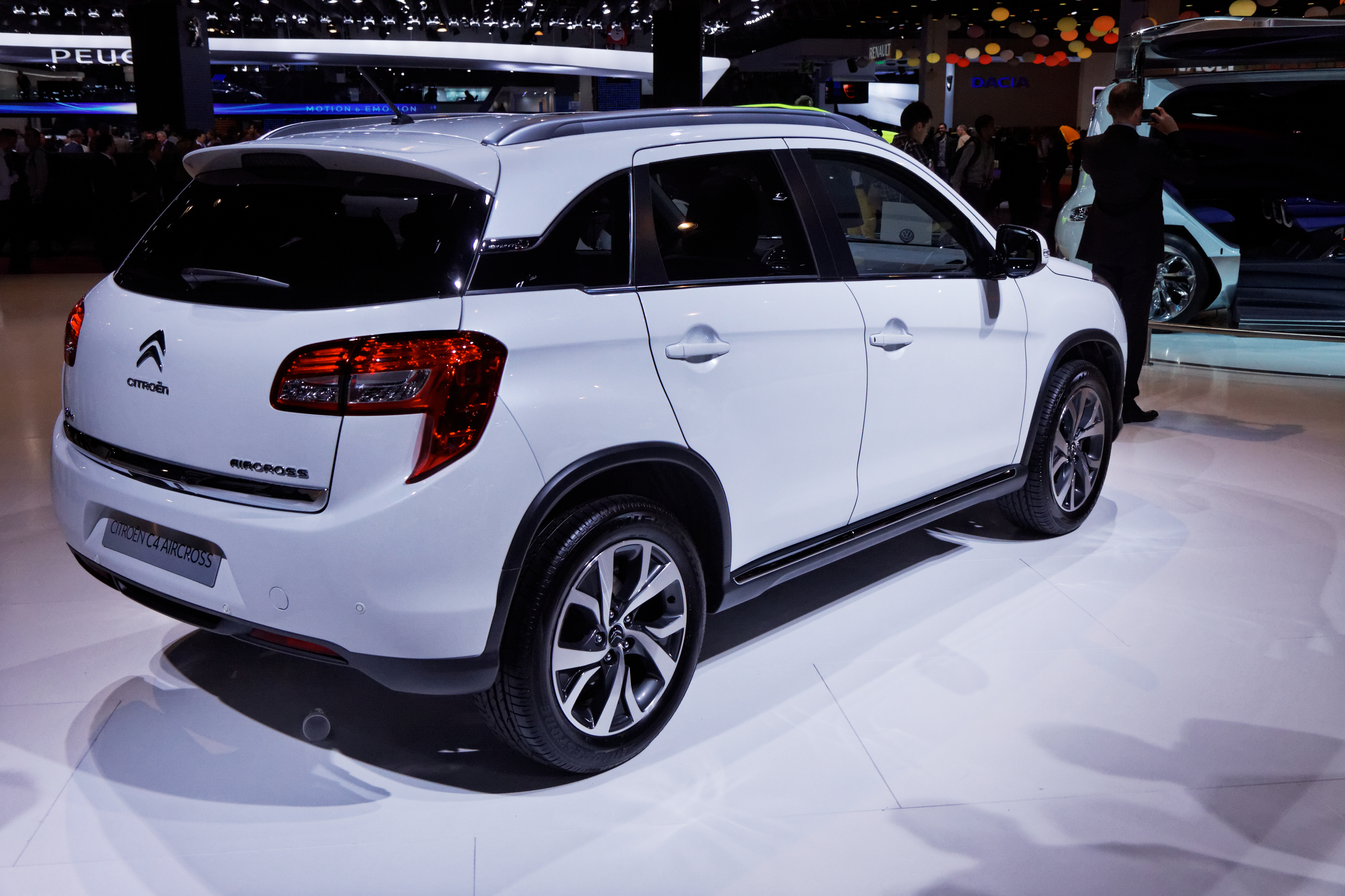 Une Citroën C4 Aircross présentée lors du Mondial de l'Automobile de Paris 2012.